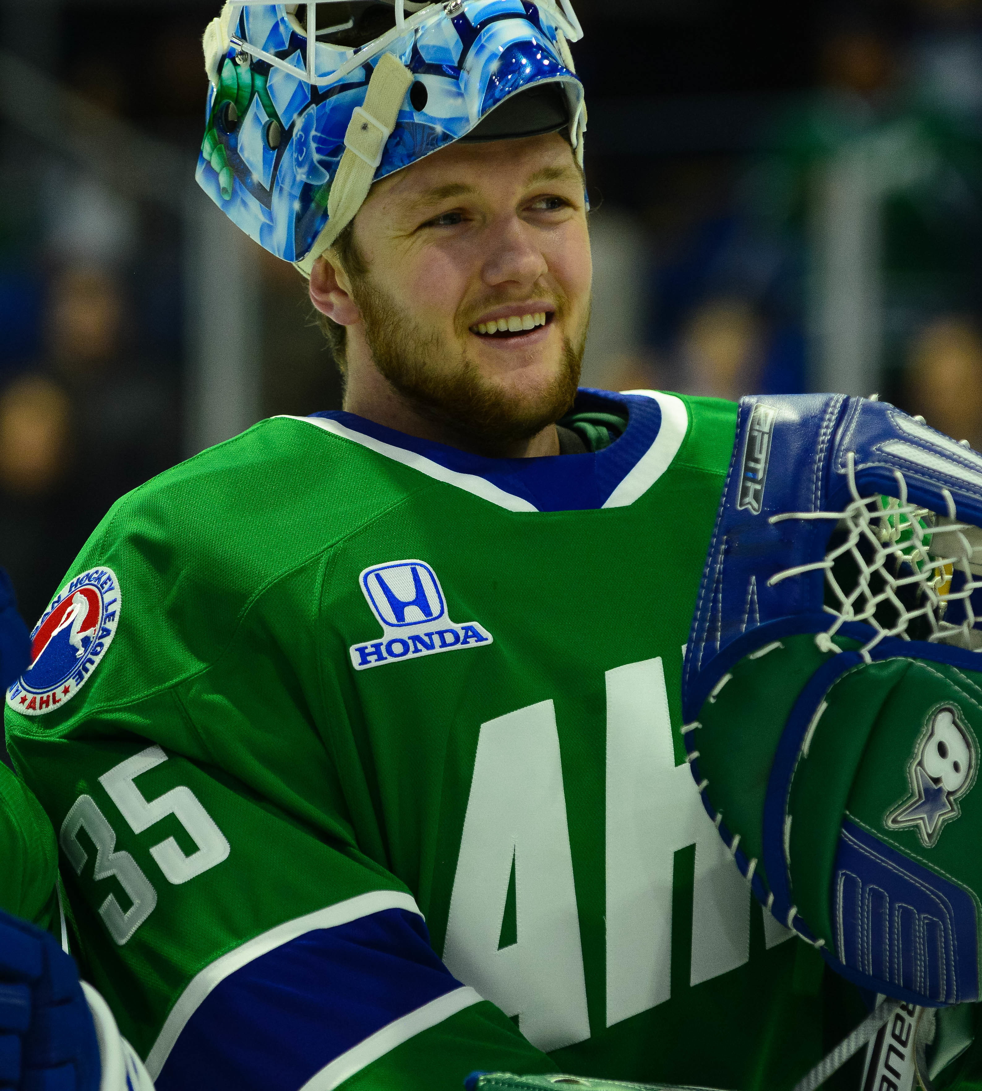 (Bryan Peck/ AHL)